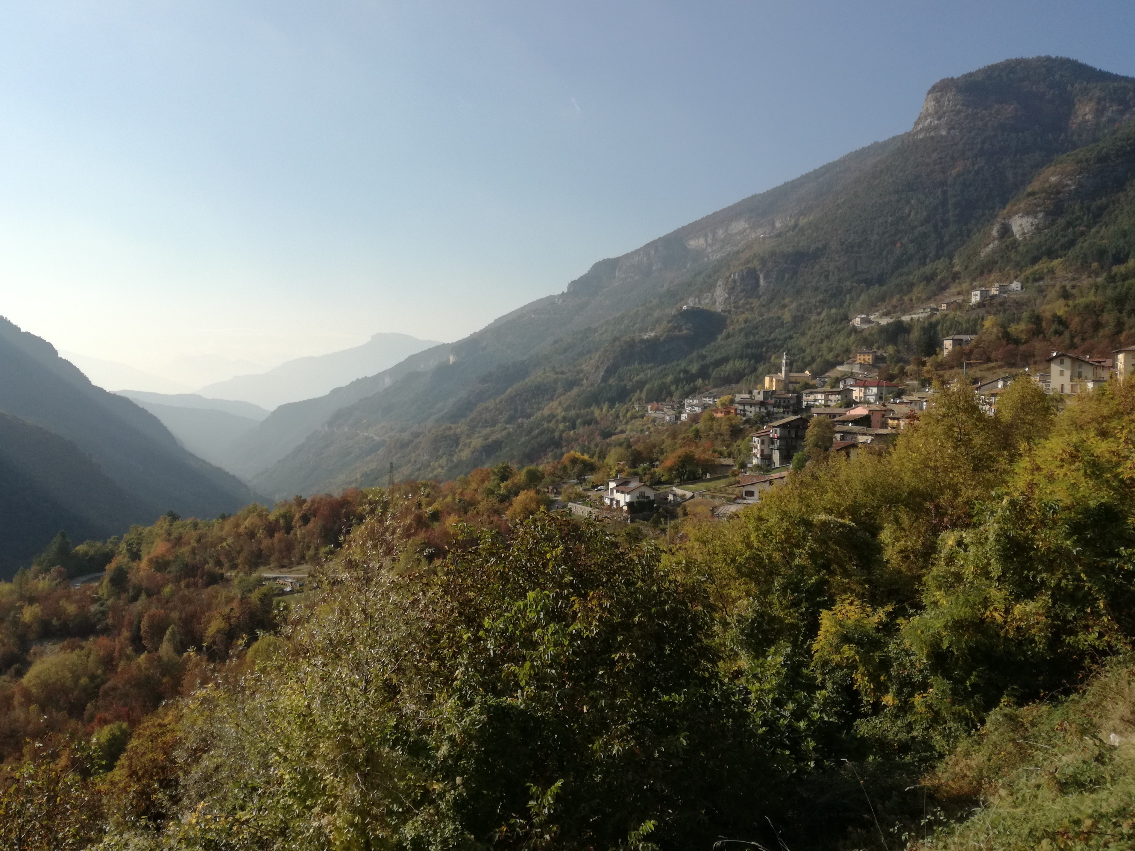 Das mittlere Val Terragnolo